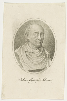 Porträt des Johann Christoph Schwarz (Jurist, Historiker, Bürgermeister von Riga) von Johann Adolf Rossmäßler, Radierer, um 1800)